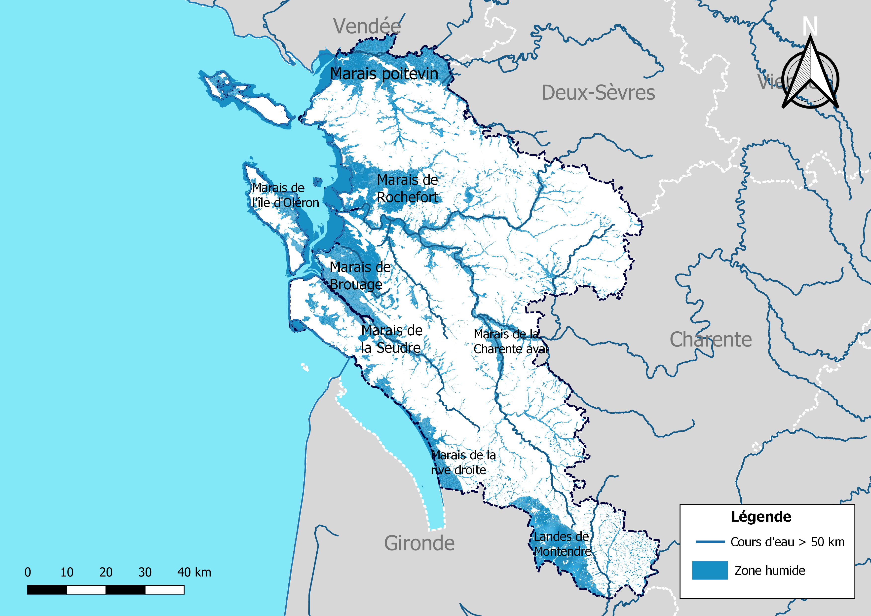 Carte des zones humides du département de la Charente-Maritime (France).